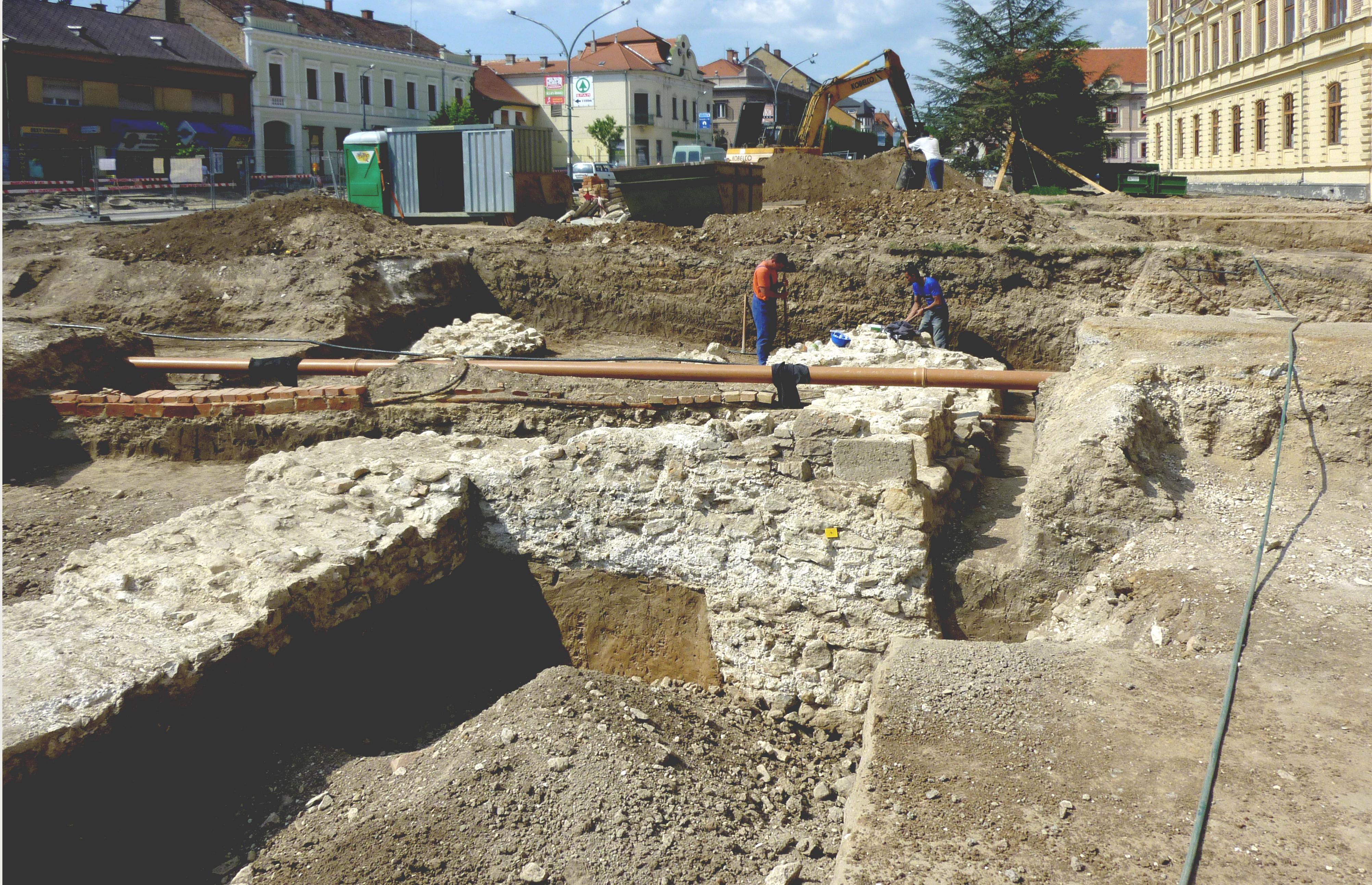 Régészeti feltárás Keszthely központjában